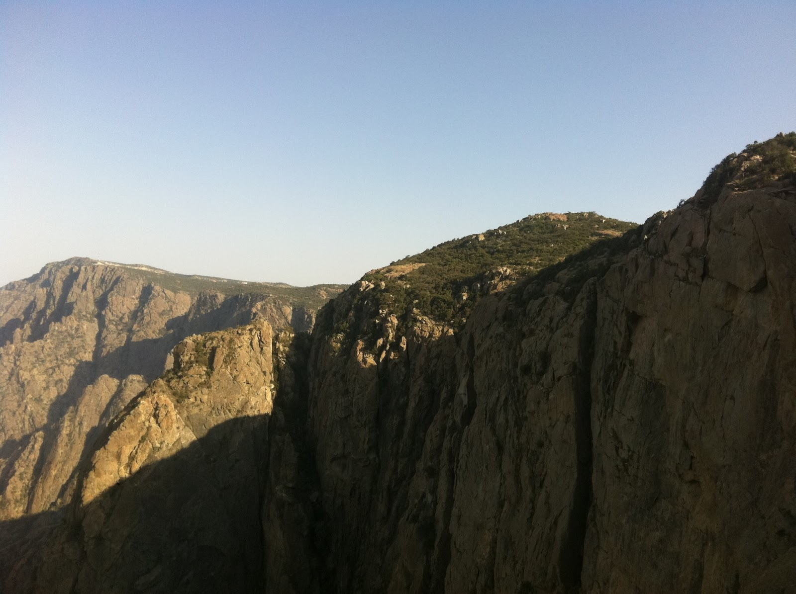 جبل مرير